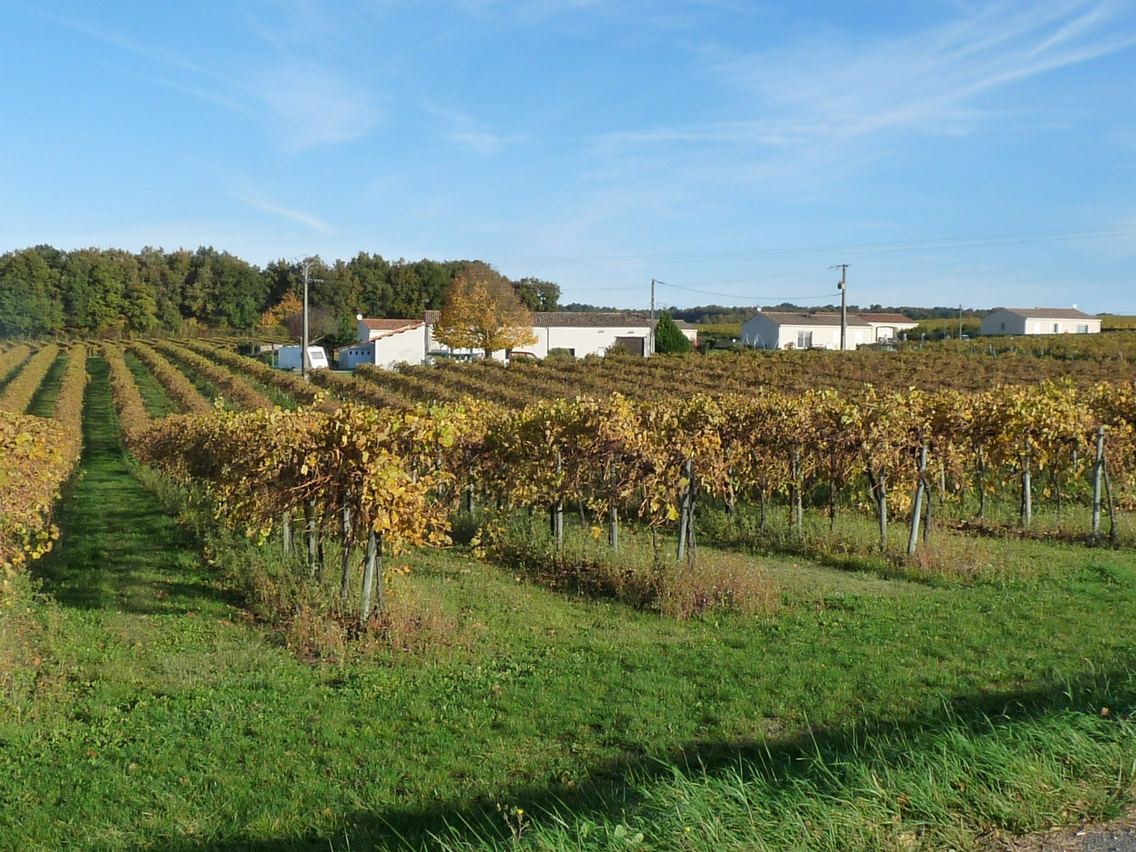 Vignoble de la Grande Champagne, Lignières-Sonneville, Charente, France